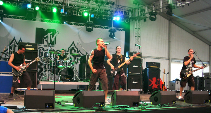 Overdrive live at Sziget 2010